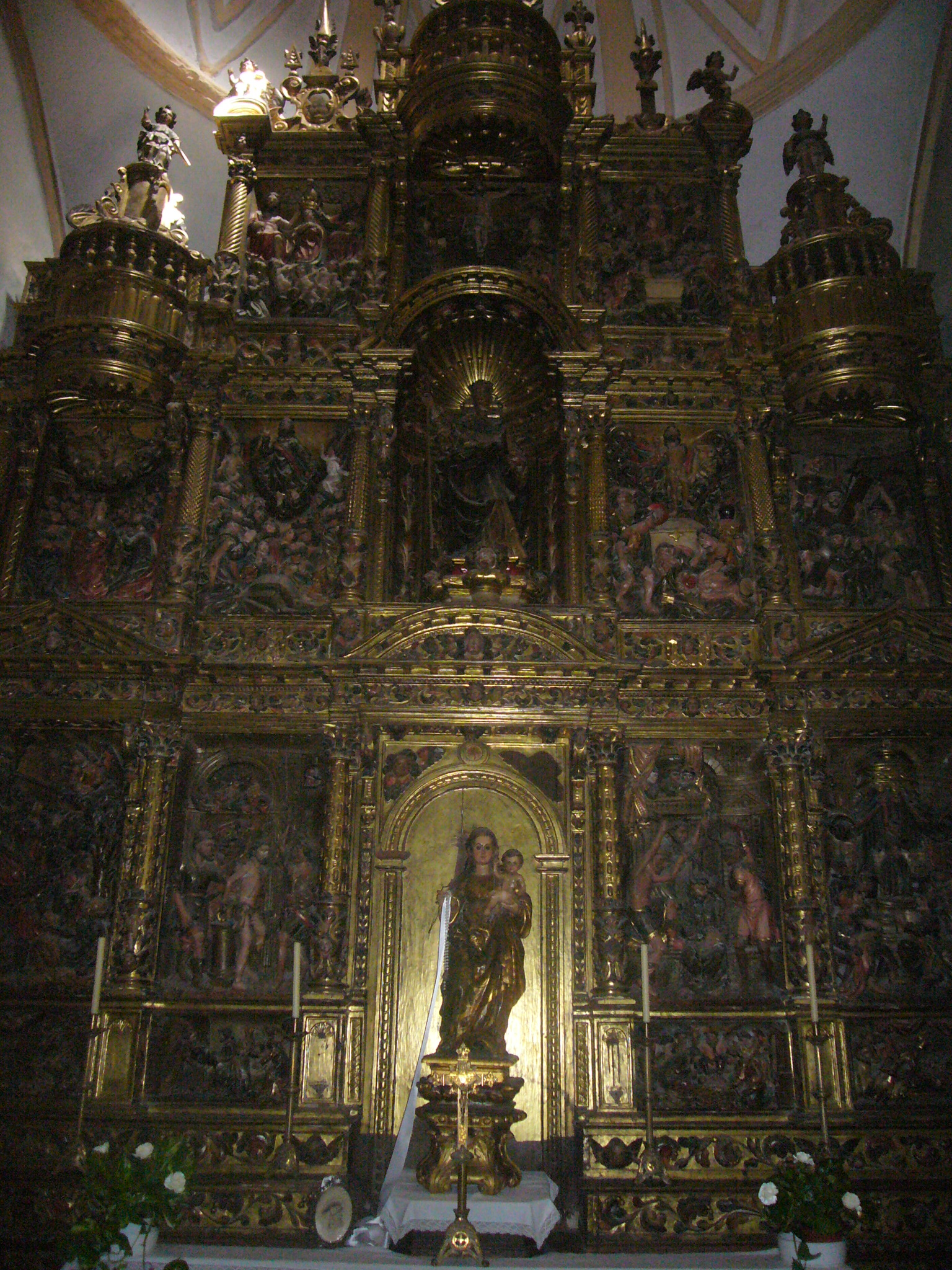 Retaule del Roser a Santa Maria d'Agramunt. Barroc català del segle XVII. Atribuit a Joan Grau o a Pau Sunyer